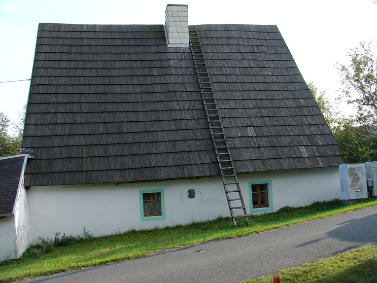 Zinnwald, Erzgebirge, Typisches Haus mit Schindeldach und Leiter